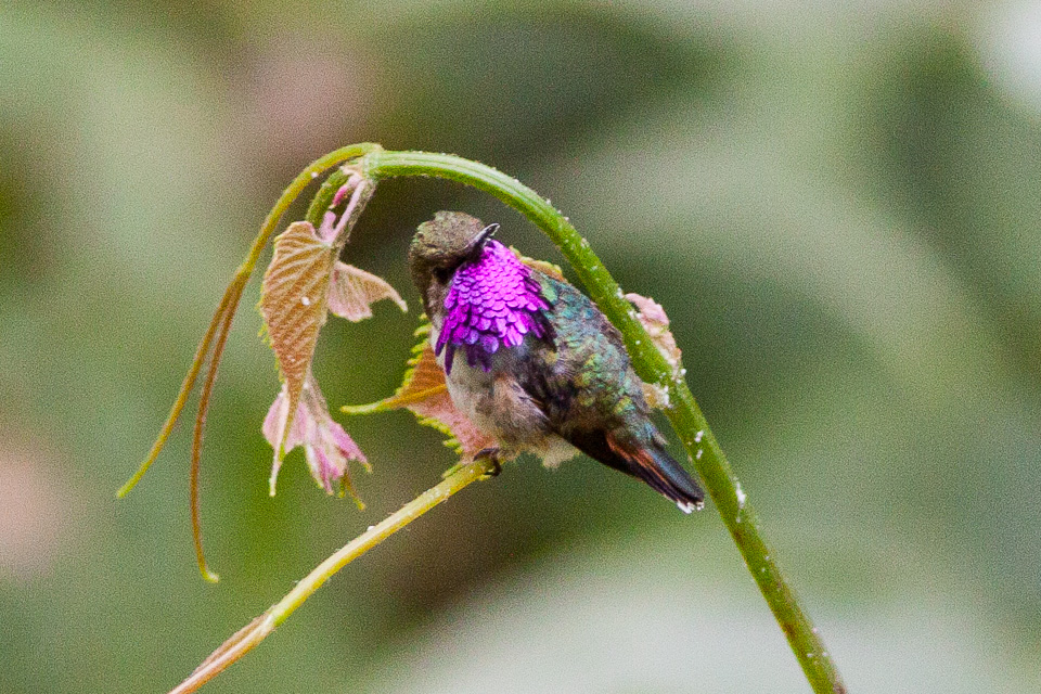 San Blas,Nayarit